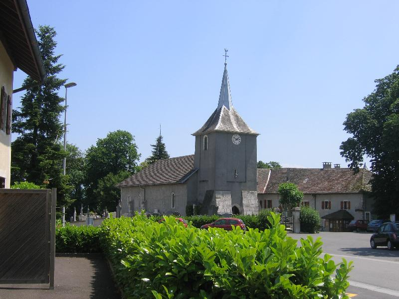 Le village de Chêne-en-Semine en Haute-Savoie